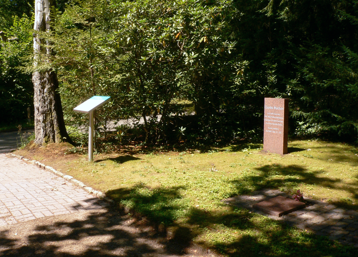 Gedenkstein Charles Machon